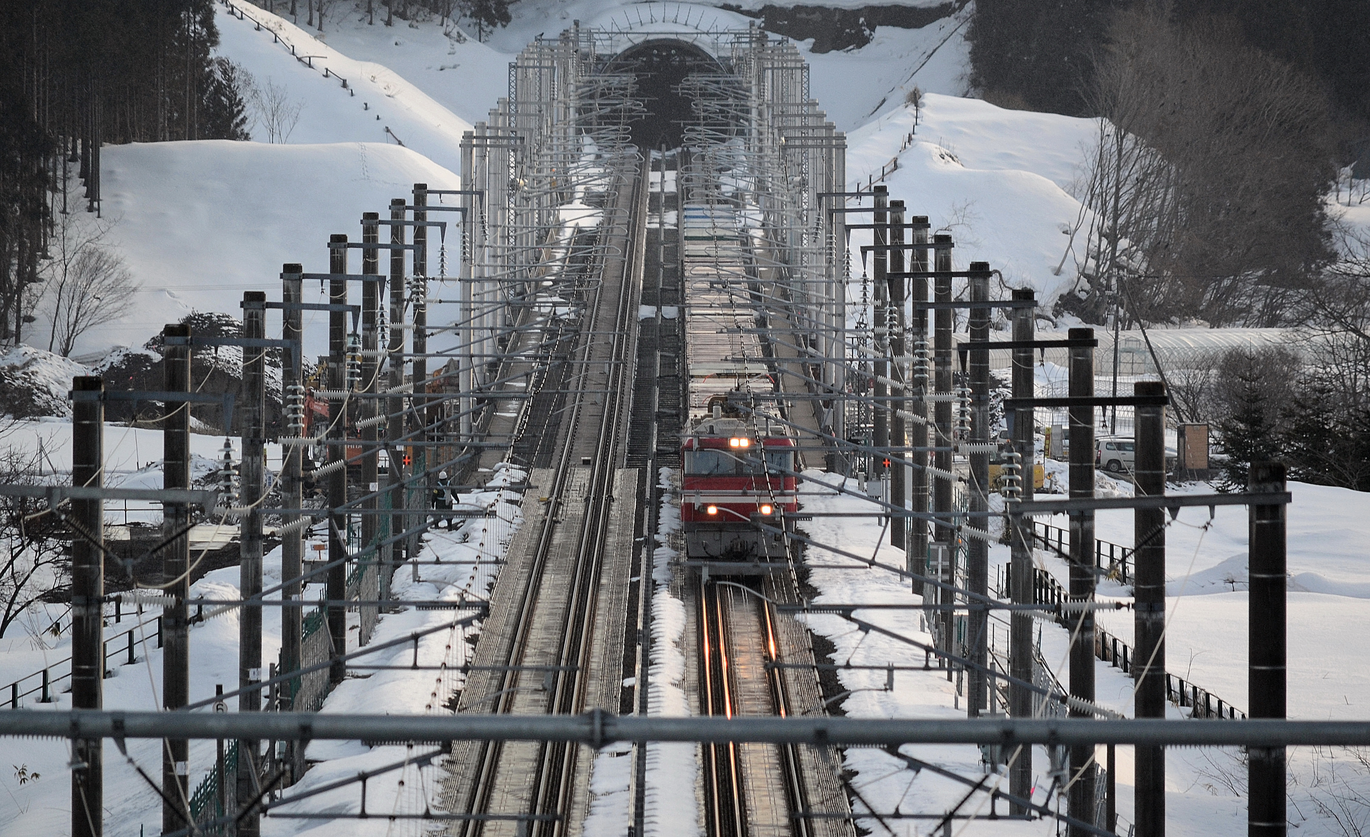 木古内町にある｢北海道新幹線ビュースポット｣から見た海峡線、下り線にEH-800が牽引するコンテナ貨物が通過中である。